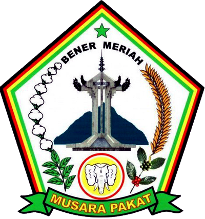 Lambang Kabupaten Bener Meriah, Aceh, Indonesia